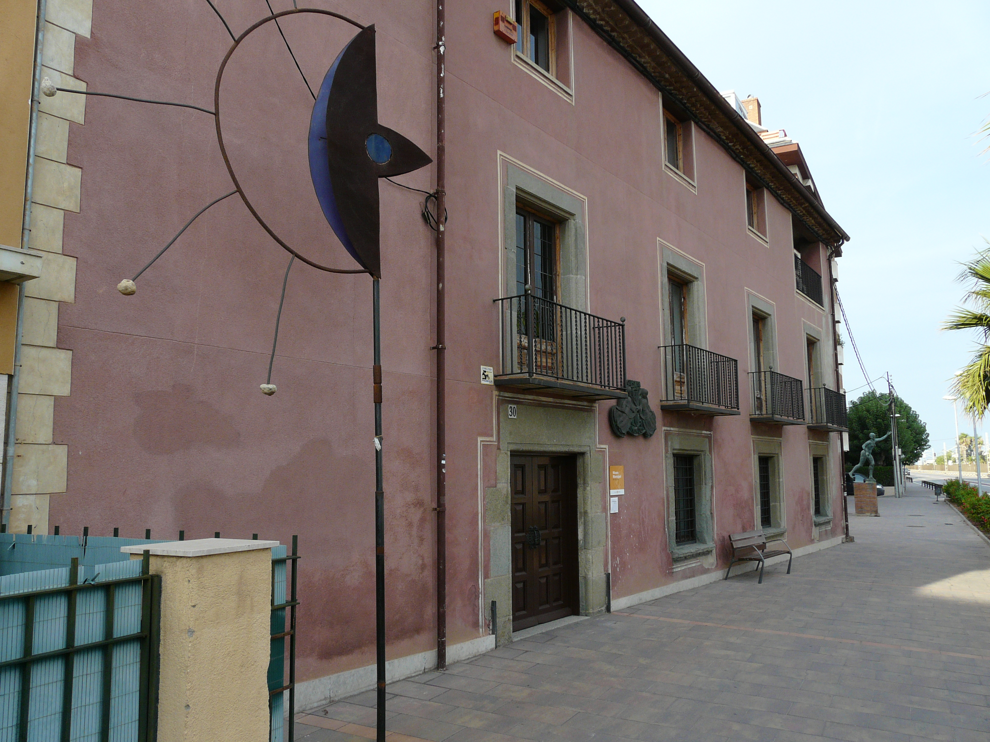 Gliptoteca Monjo. Camí Ral, 30 (Vilassar de Mar). Object location41° 30′ 11.09″ N, 2° 23′ 40.6″ E